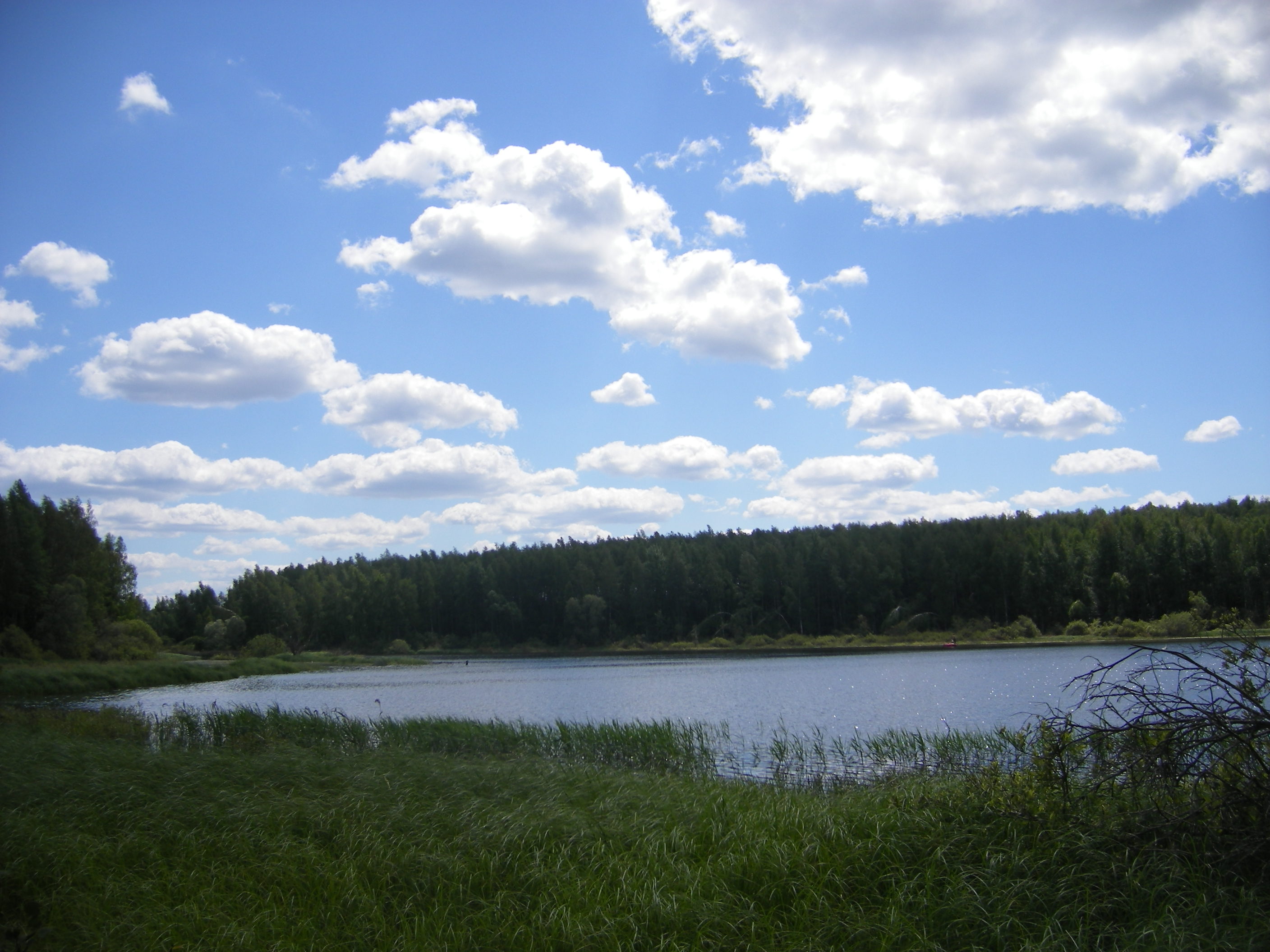 Озернинское водохранилище 01072012